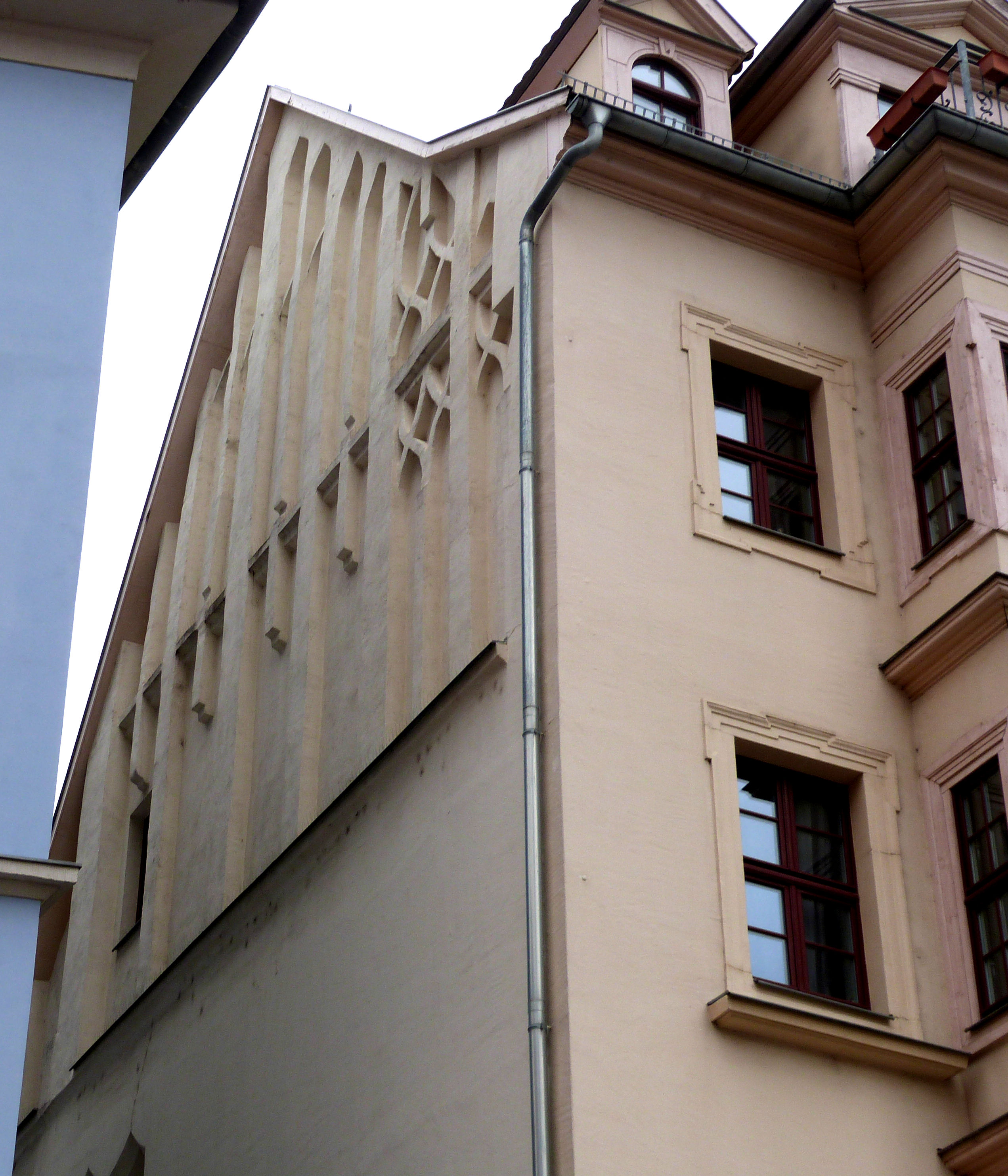 Spätgotischer Giebel am Haus Markt 15, gehörig zum Komplex Kühler Brunnen, Halle (Saale)